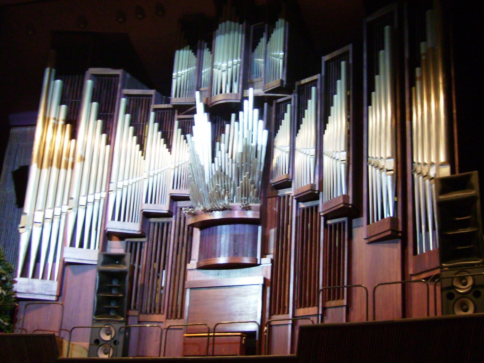 Schuke organ in Varna